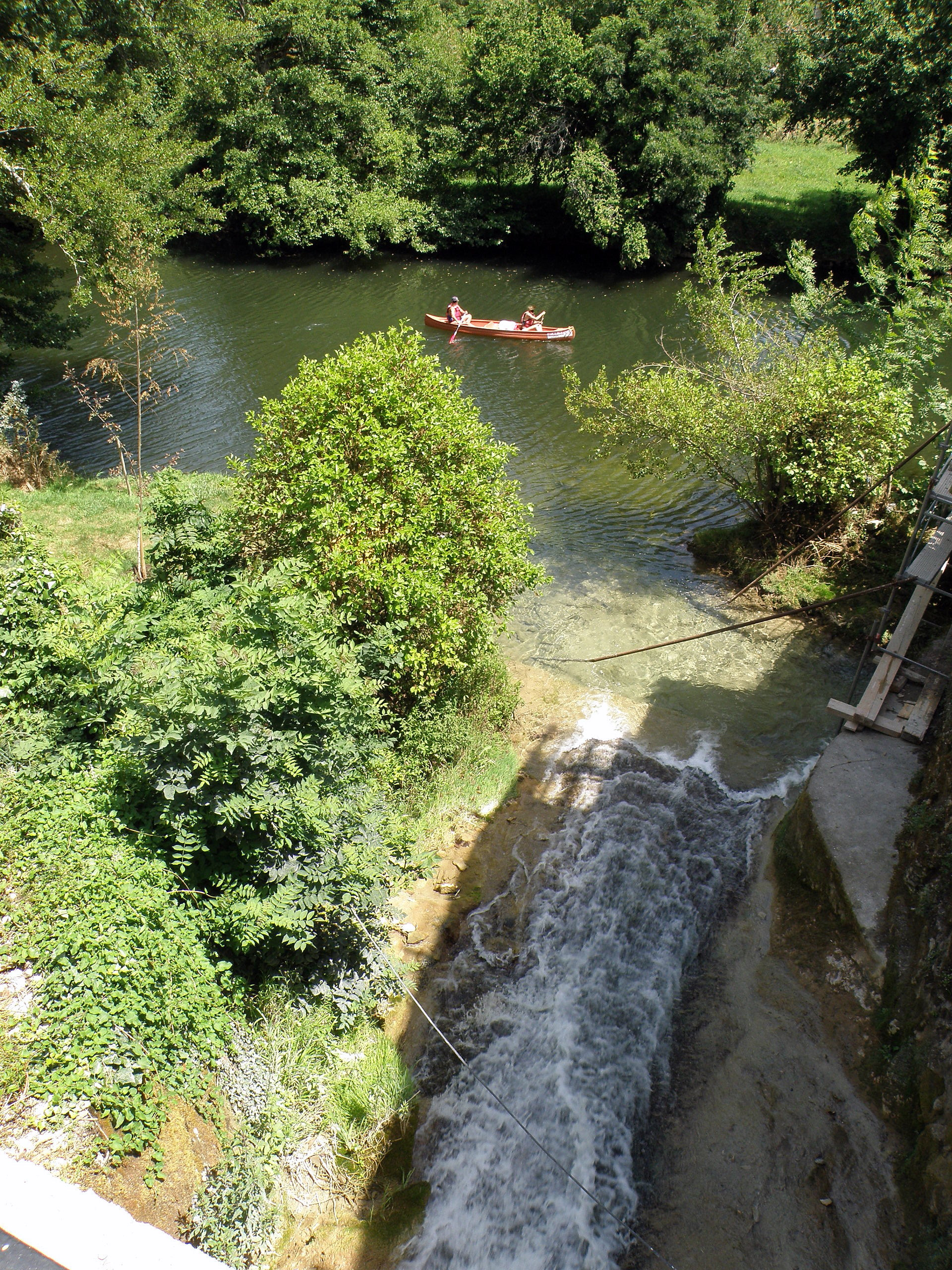 Cabrerets, commune et village dans le département du Lot (région Midi-Pyrénées, France), situés sur le Célé, affluent droit du Lot, à une vingtaine de km (à vol d’oiseau) à l’est-nord-est de Cahors. Le ruisseau la Sagne (à l'avant-plan), affluent droit du Célé (au second plan, coulant de gauche à droite), à son embouchure dans la rivière.